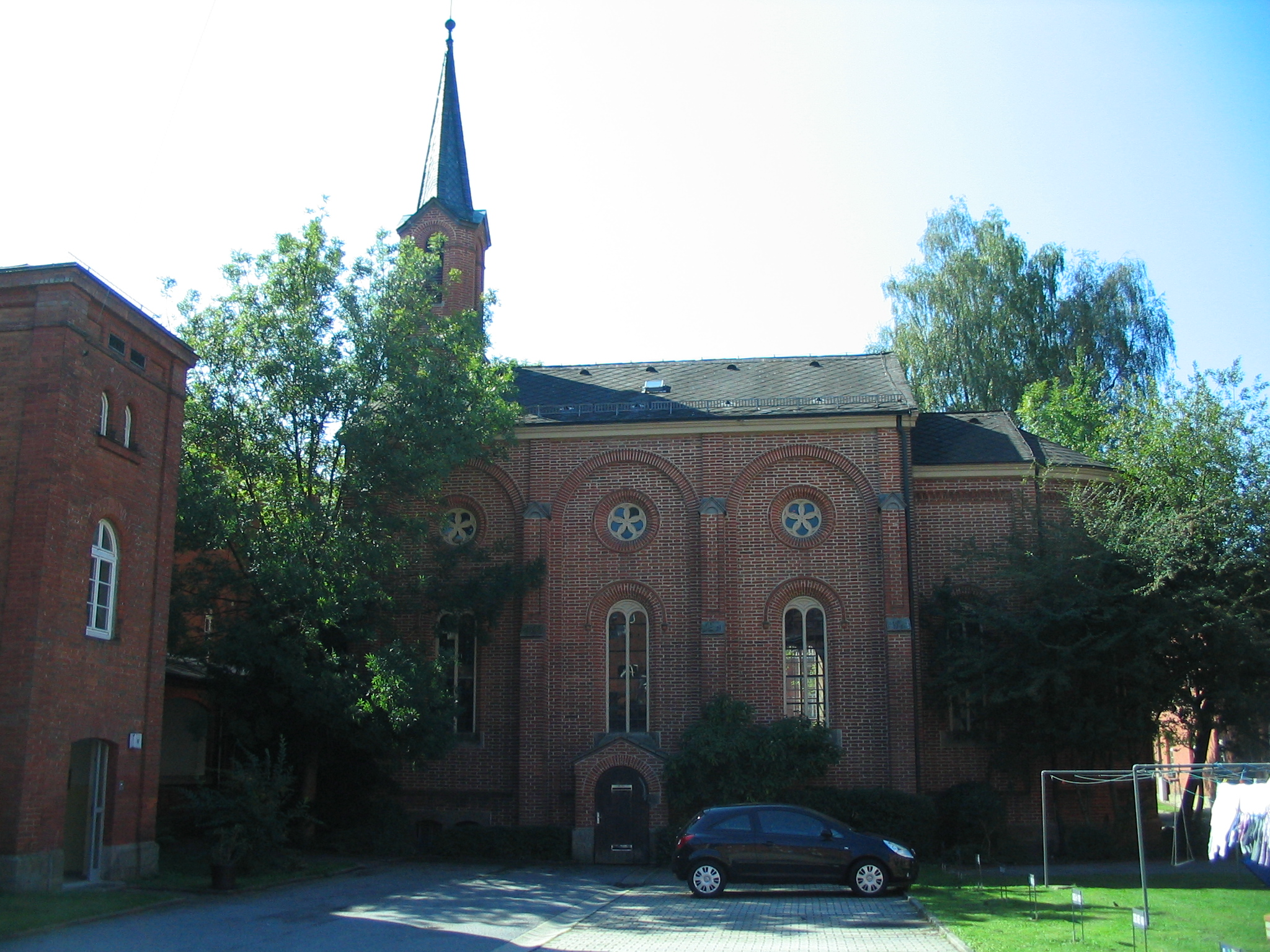 Kirche in der ehem. Kreisirrenanstalt DeggendorfThis is a photograph of an architectural monument.